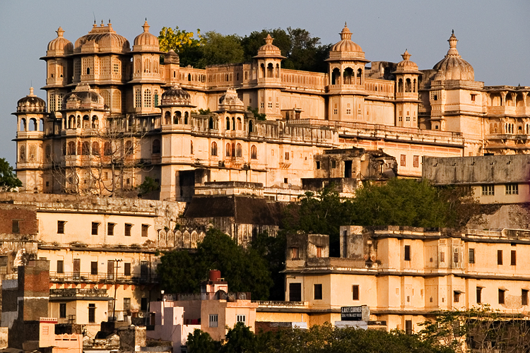 Udaipur/Rajasthan/India City Palace